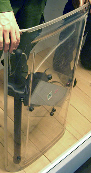 Schutzschild mit Schlagstock der Bayerischen Landespolizei (der Sonderausstellung 60 Jahre Bayerische Polizei in Ingolstadt)